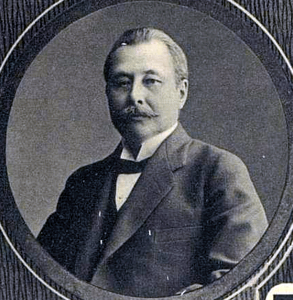 Гайса Хамидуллович Еникеев (вариант имени Айса[1], фамилии — Еникиев[2]; 2 июля 1864, Оренбургская губерния — март 1931, Уфа) — учитель, просветитель, этнограф, депутат III и IV Государственной думы от Казанской и Оренбургской губерний (1907—1917).